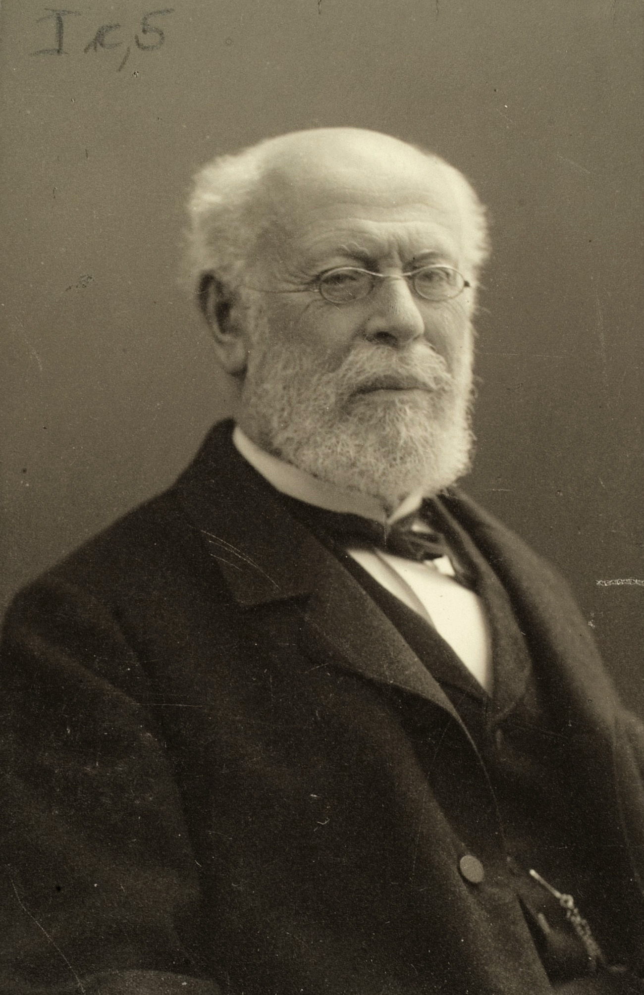 Moritz Benedikt Cantor, Mathematiker, 1852–1889 Professor in Heidelberg